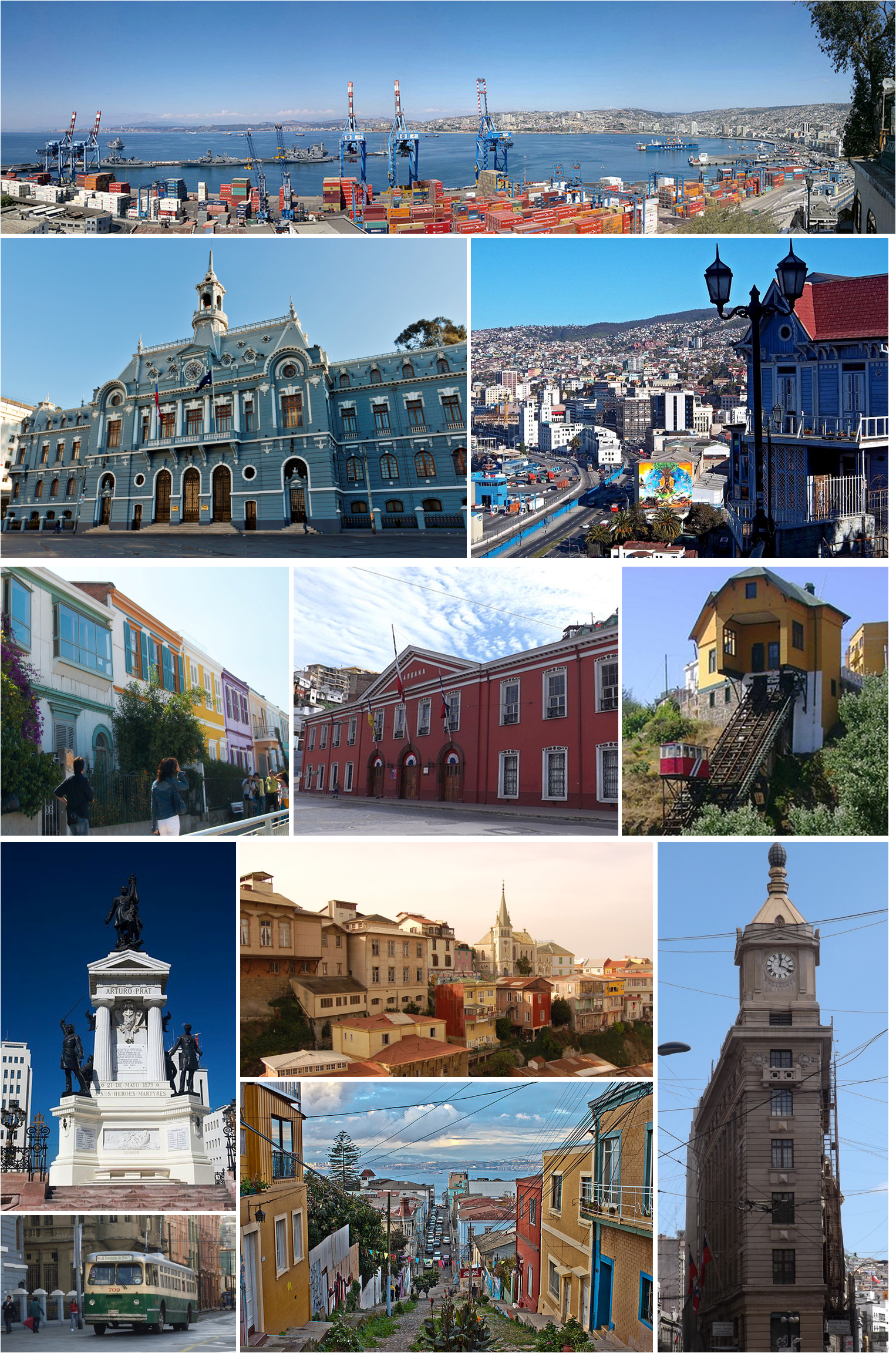 montaje de imágenes de la ciudad de Valparaíso Trabajo derivado de: Valparaíso panorámica Cerro Concepcion Comandancia Armada Valparaíso Sector Bancario de Calle Prat Reloj Turri Valparaíso - 20081207-48 Casona Artillería Nº 156 Ascensor Barón 1 Valparaíso - 20081207-46 Trolley en Valpo Color Templeman Aduana Valparaiso-Vista